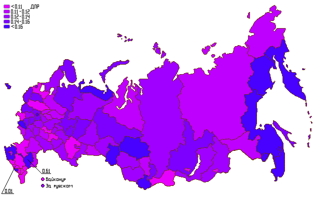 Результаты политической партии ДПР на парламентских выборах 2007 года (по регионам)